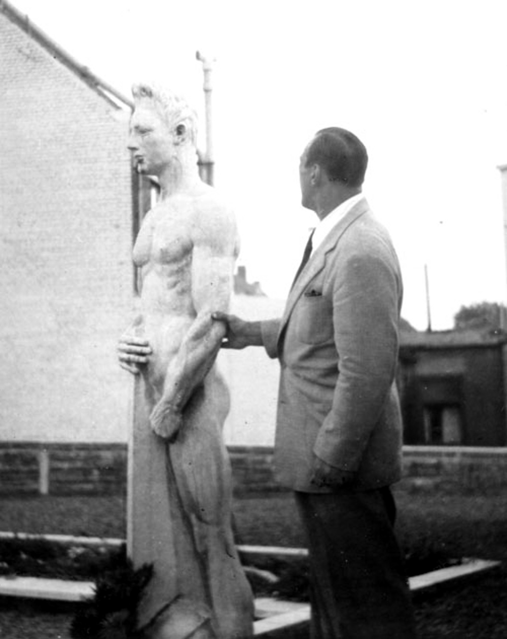 Primo Carnera tiene il braccio della statua "Il minatore di tutti i paesi", opera dello scultore Francesco Libonati. (Quaregnon, Belgio)